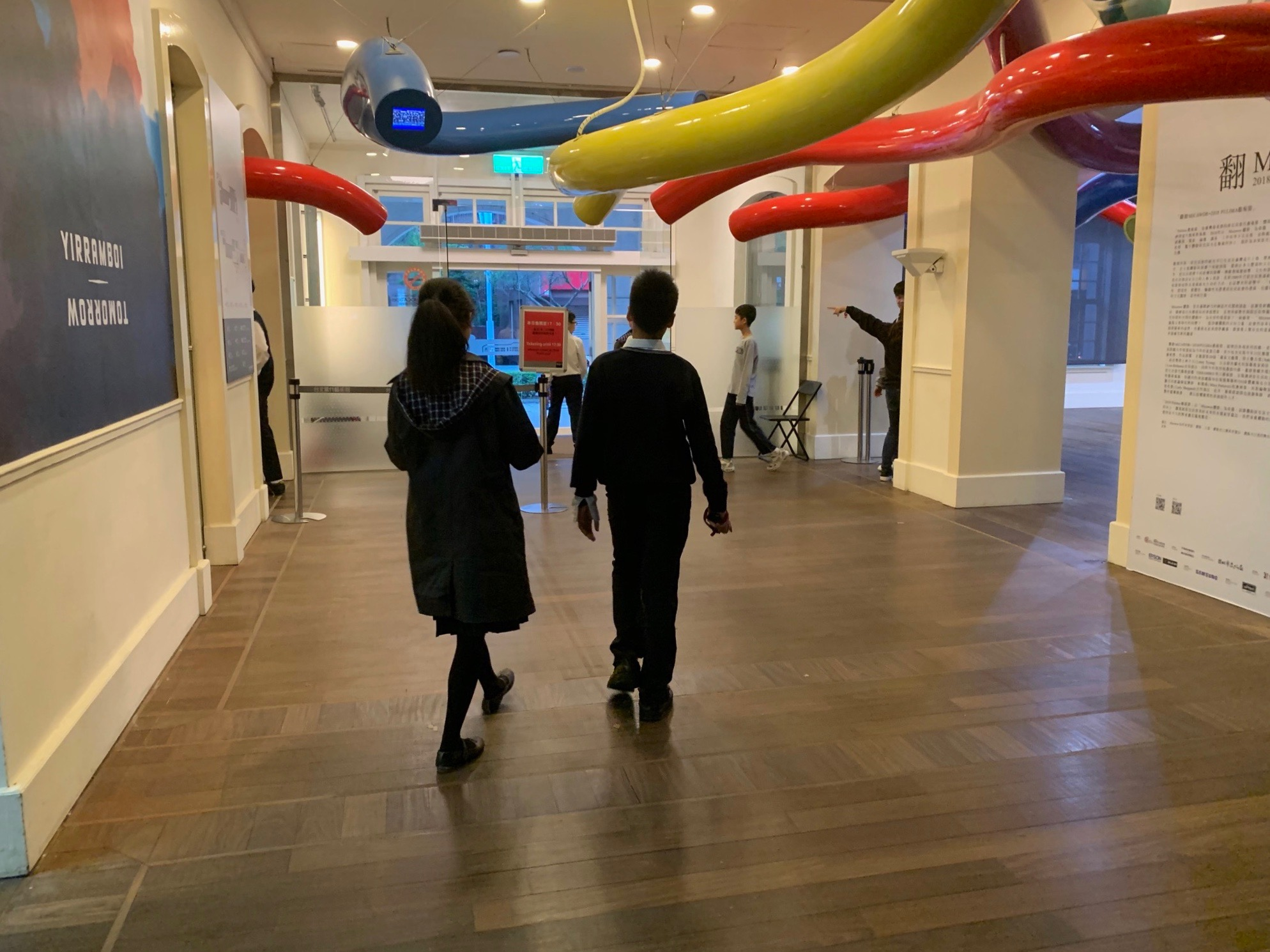 著制服之學生參訪台北當代藝術館。